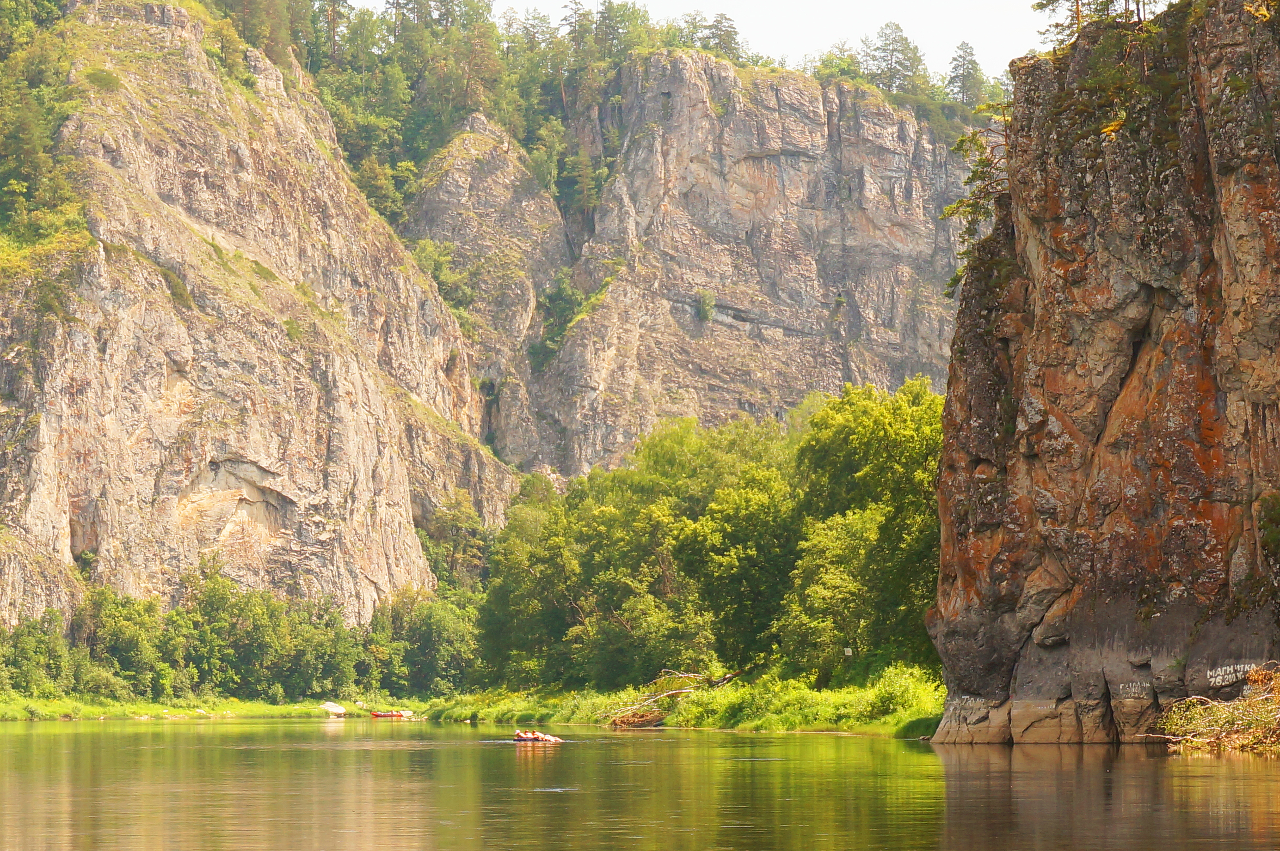 Башкирский государственный природный заповедник: Старосубхангулово,Бурзянский район, Башкортостан This image is related to the protected area of Russia number 0200099